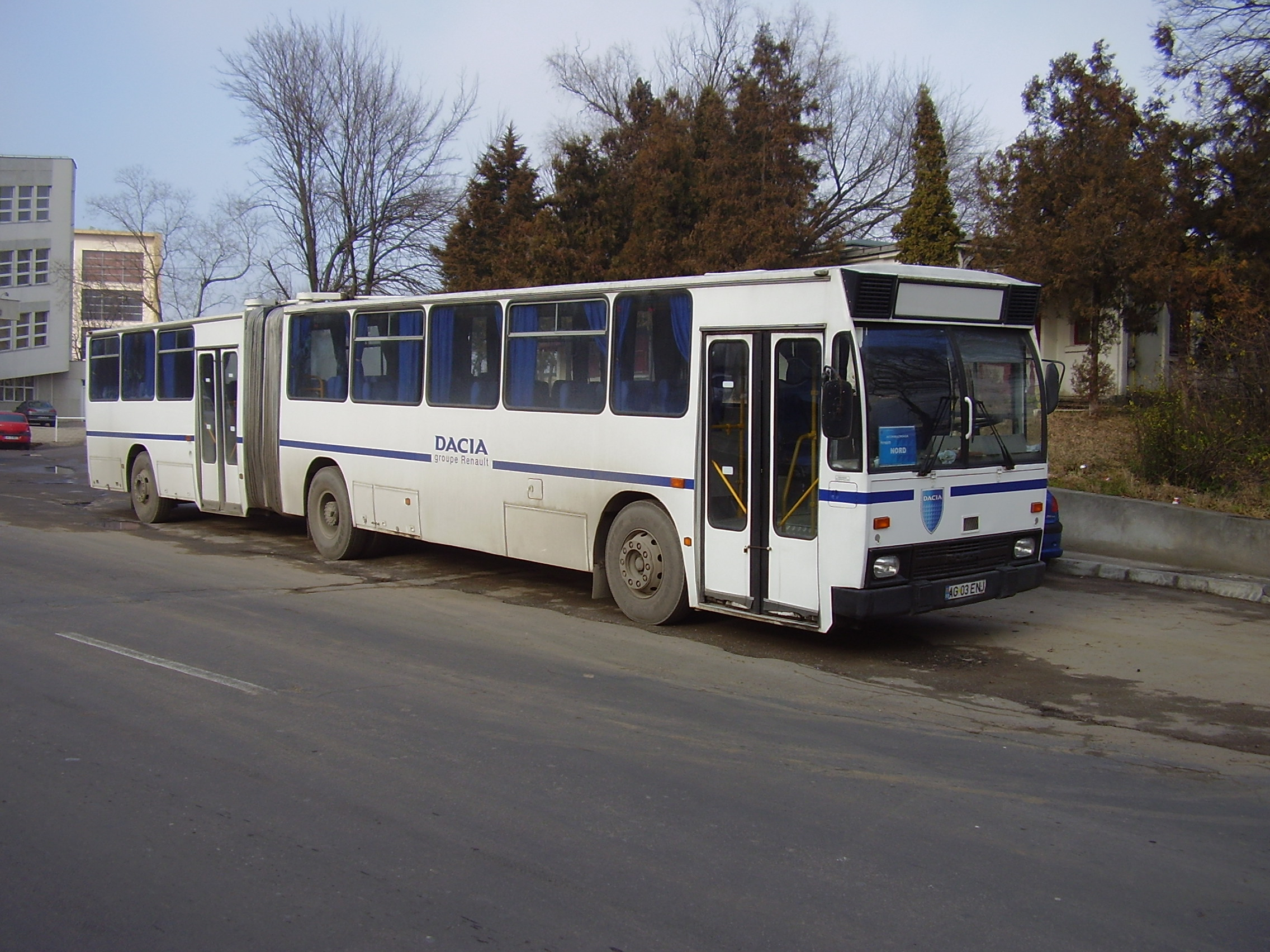 Autobuz Rocar 117 UD al Uzinelor Dacia Piteşti